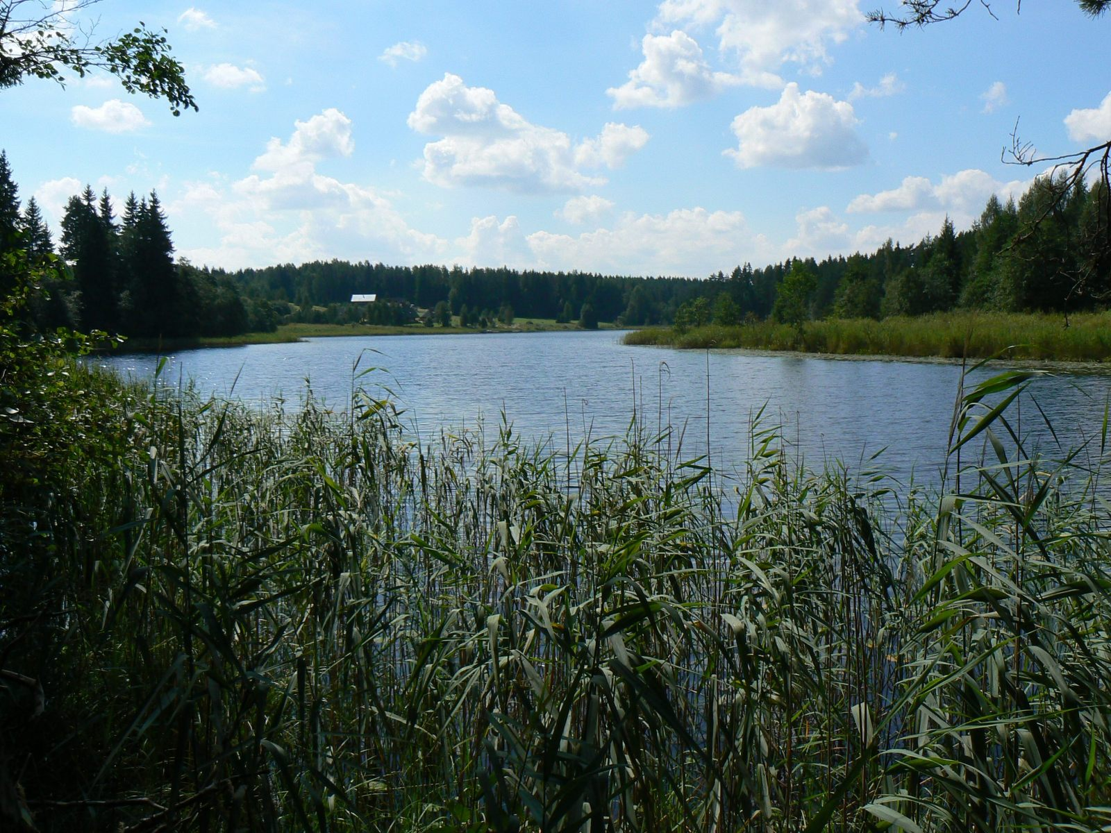 Vähkjärv (ka Piigandi Vähkjärv)